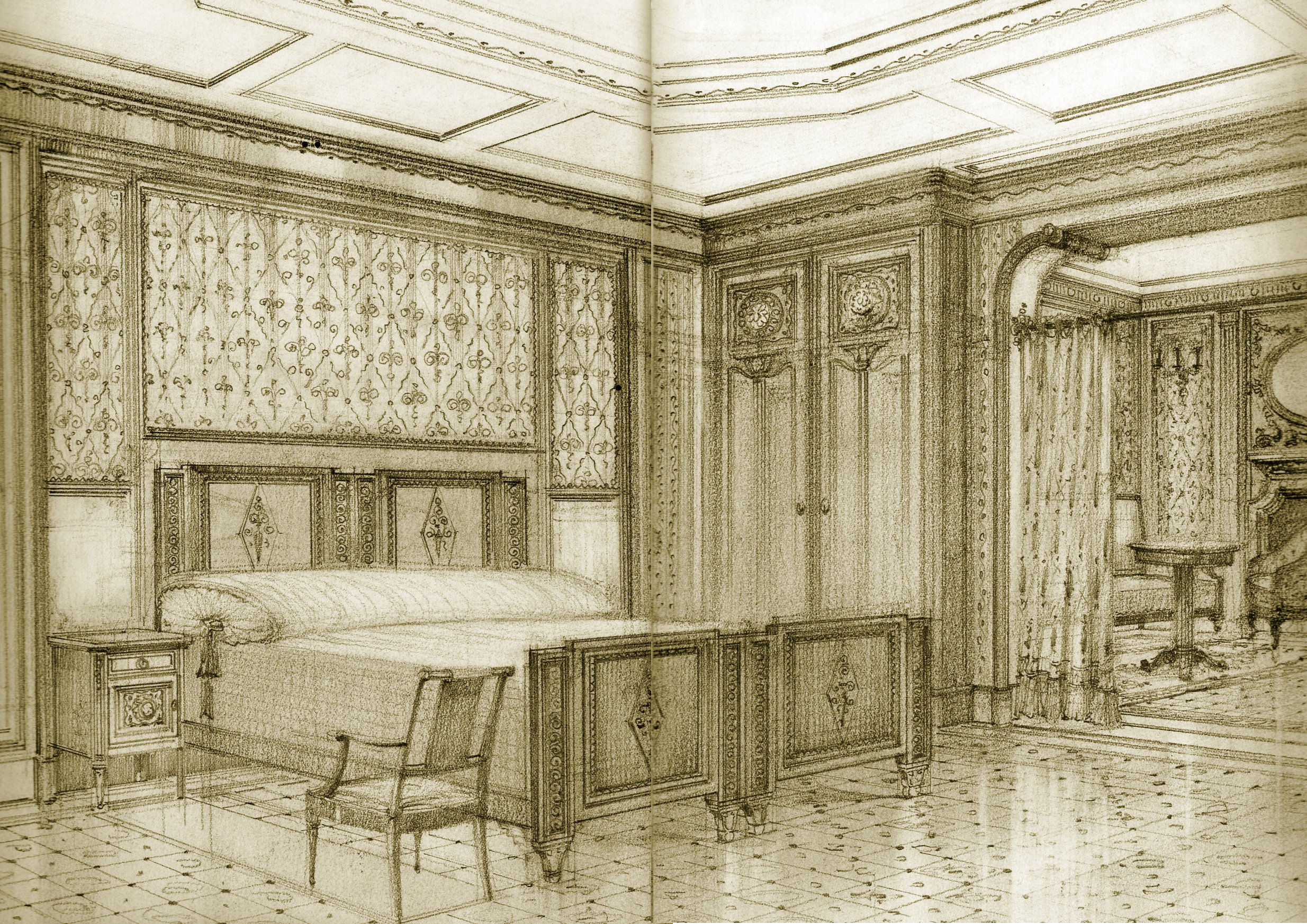 Uno degli appartamenti del transatlantico Rex. Progetto di camera da letto con passaggio ad un salotto realizzato da Ambrogio Fossati. Matita su cartoncino 1930 circa